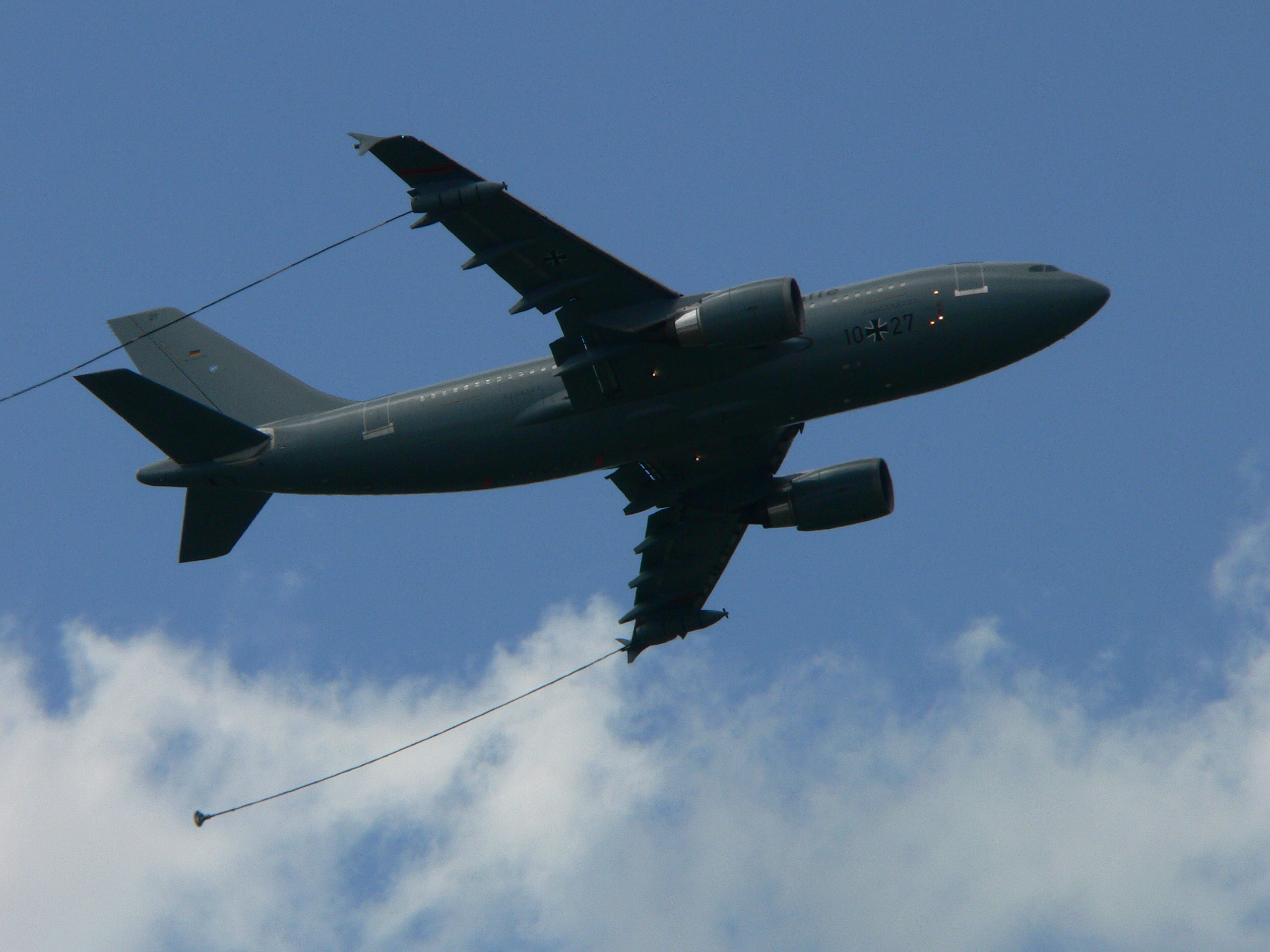 Airbus A310 MRTT, German Luftwaffe